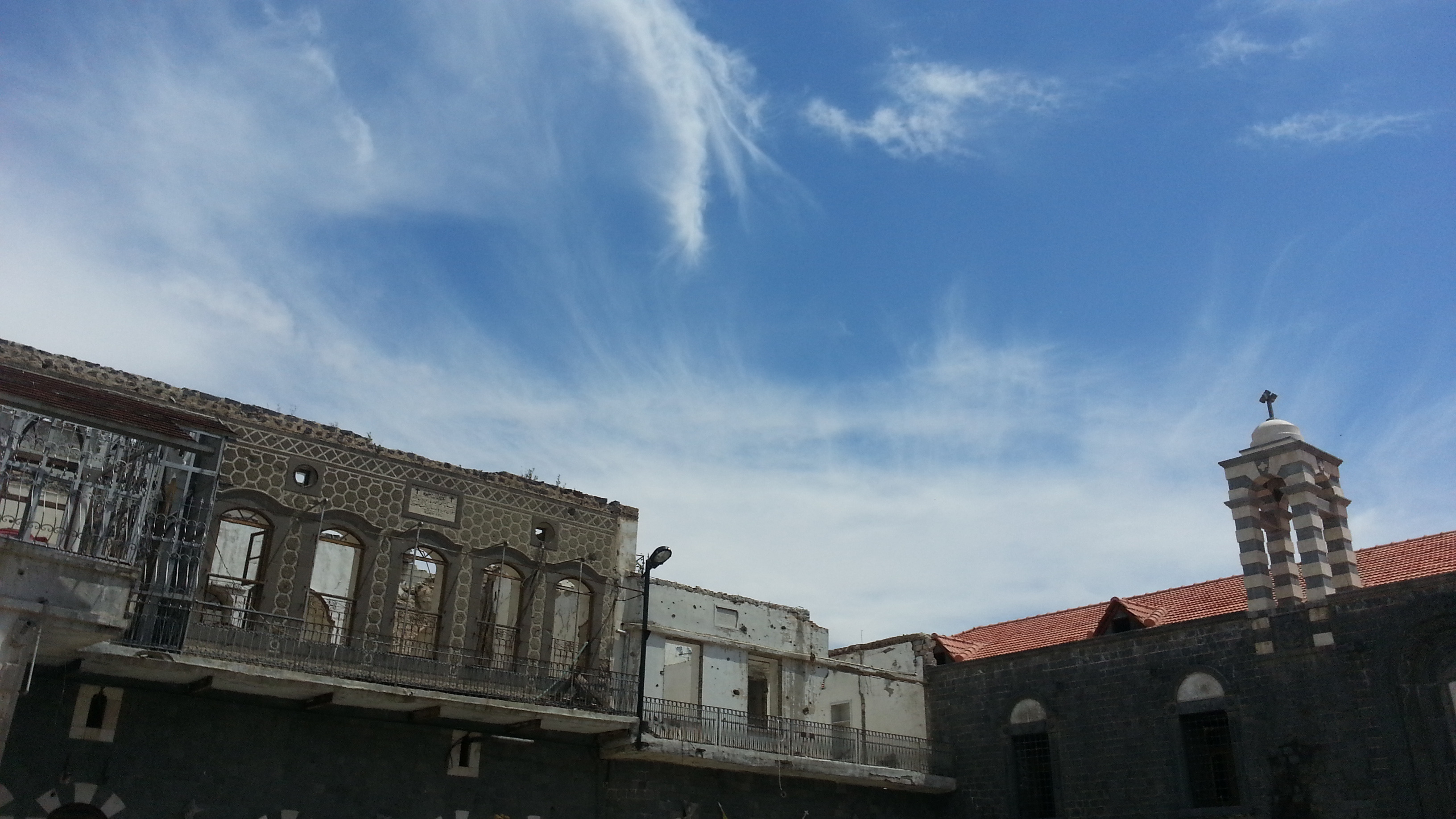 حمص القديمة